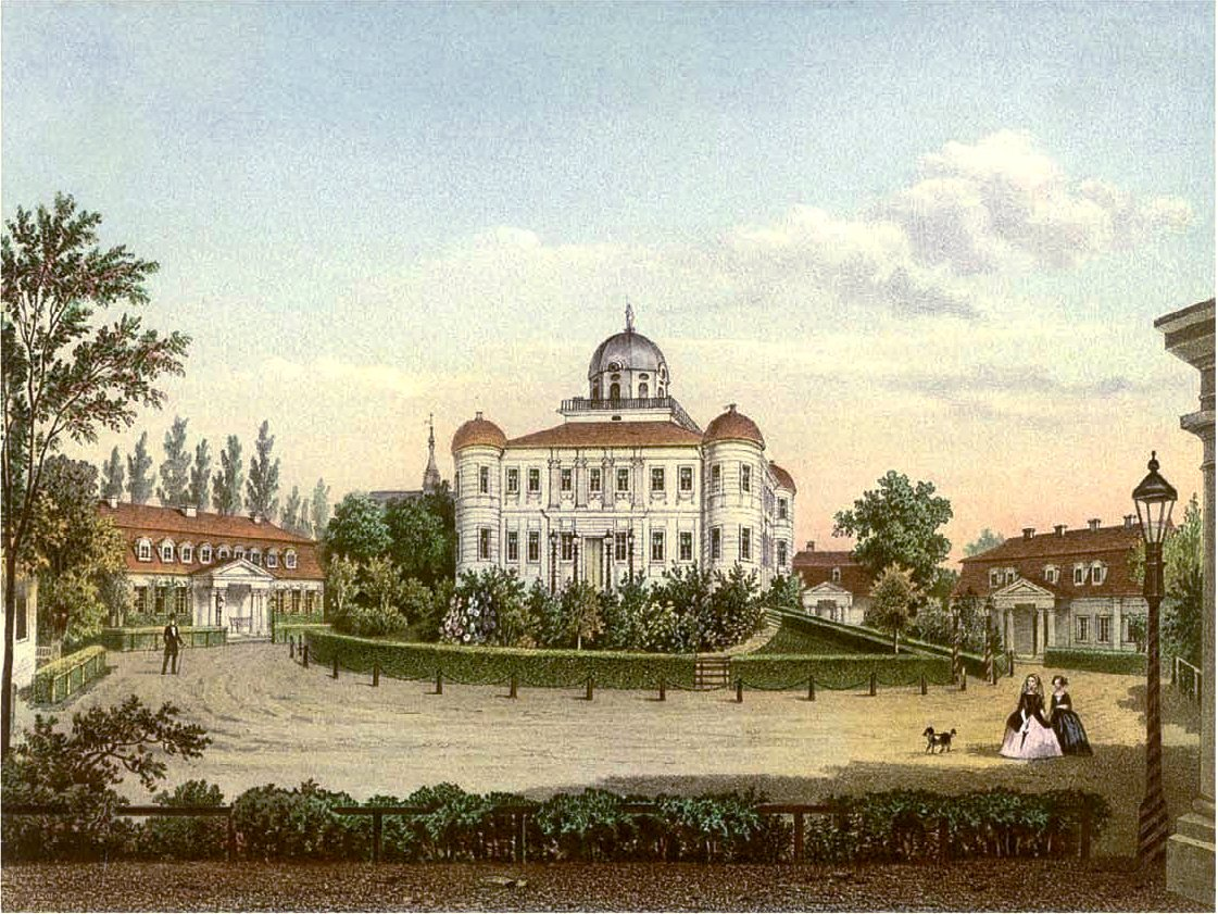 Schloss Carlsruhe, Kreis Oppeln, Provinz Schlesien